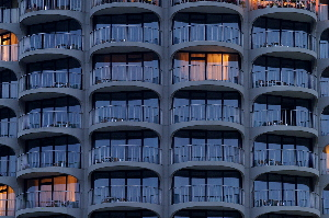 Detailansicht des Turms Möglichkeiten zur Lizenzierung, bitte die nicht-benötigte Variante aus dem Code löschen